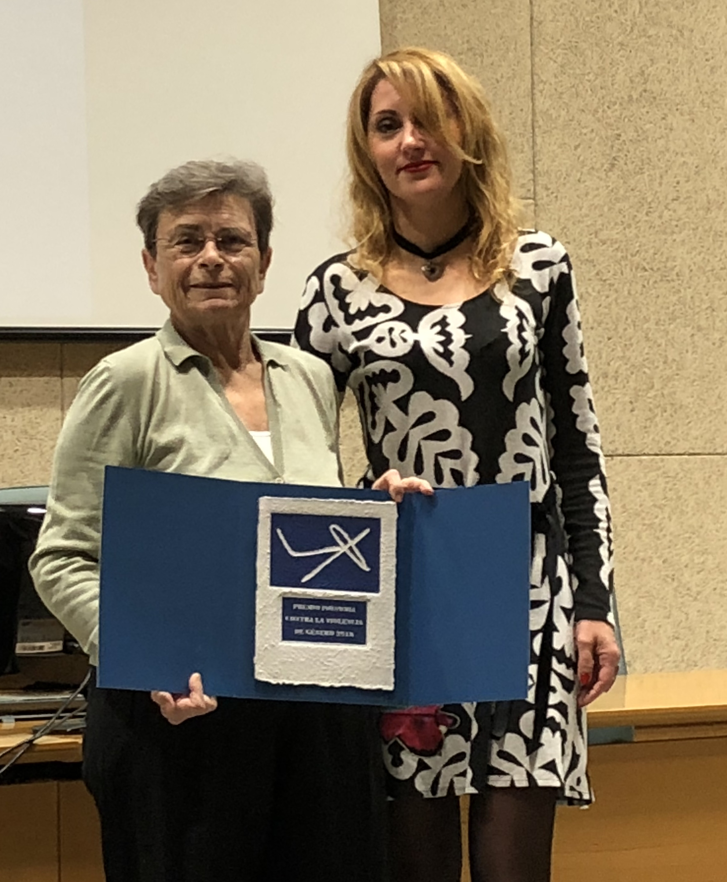 Premio Isonomía 2018. Eulalia Lledó y Pilar Safont Vicerectora de la Universitat Jaume I